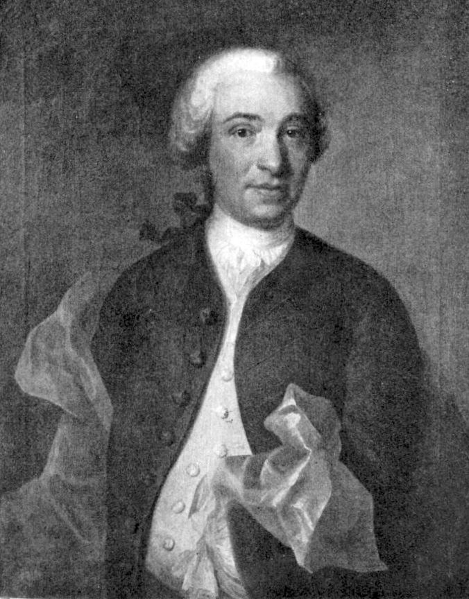 Daniel Pettersson (1720–1802).